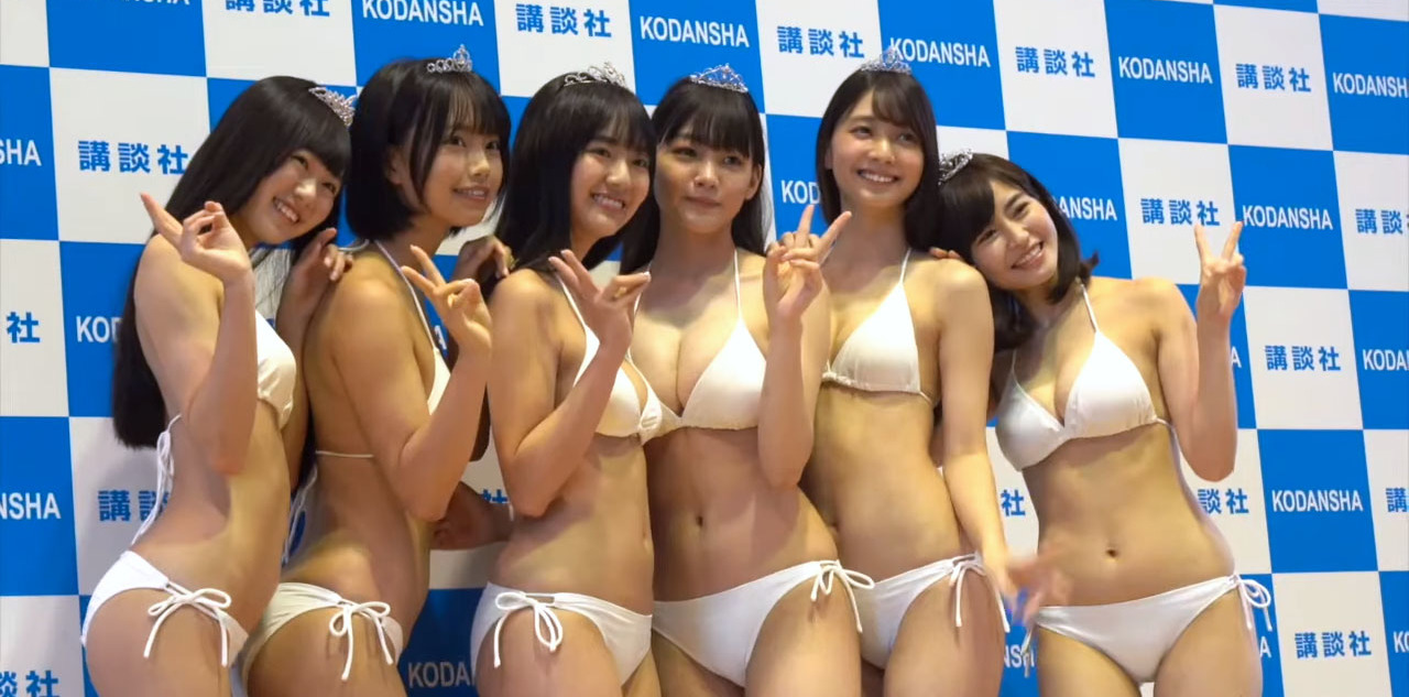 ミスマガジン2019 グランプリ発表会